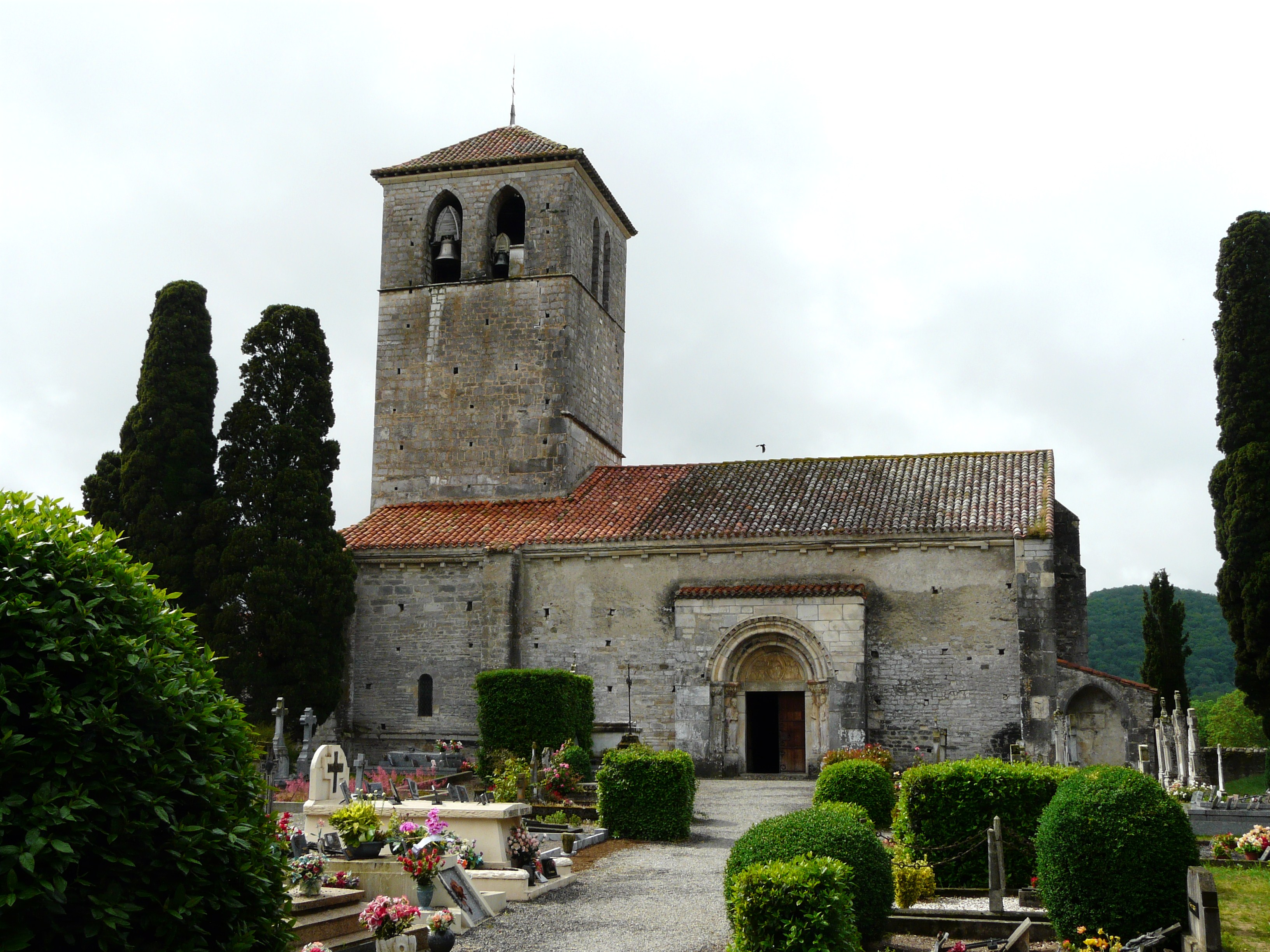 La basilique Saint-Just de Valcabrère, Haute-Garonne, France.